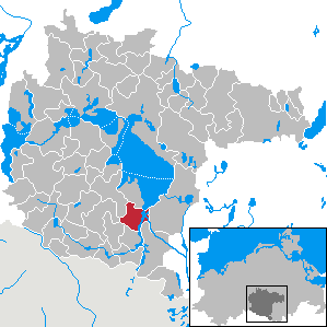 Vipperow im Landkreis Müritz, Mecklenburg-Vorpommern